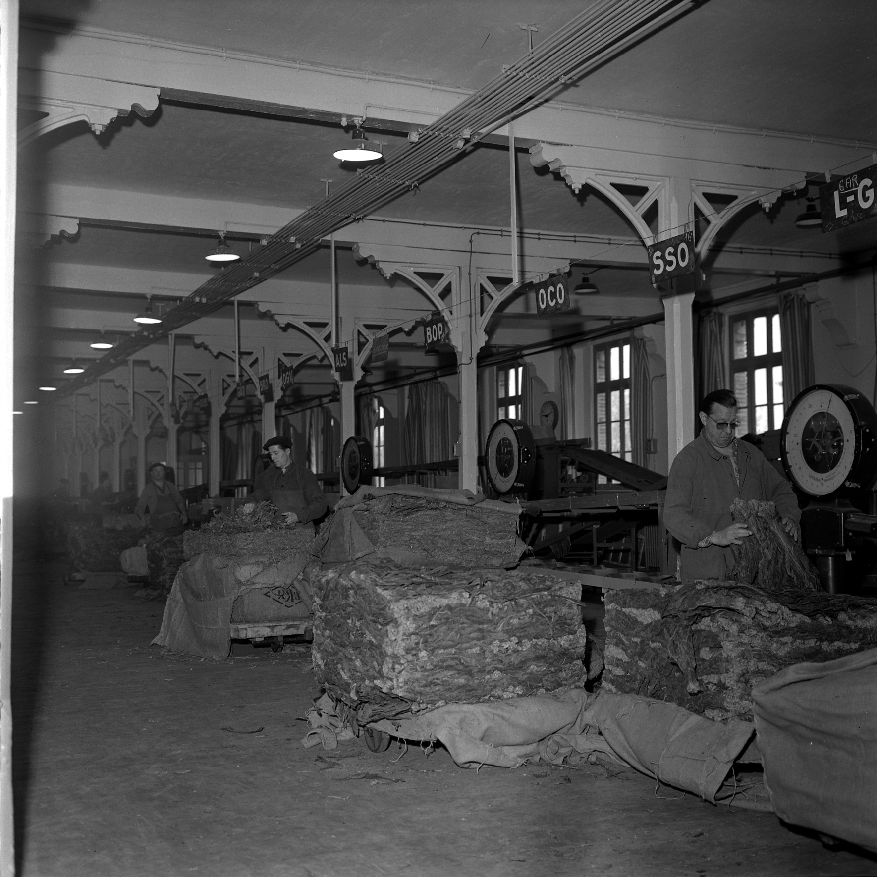 Manufacture des Tabacs. Le 21 Novembre 1961. Vue d'un atelier ou les ouvriers travaillent le tabac devant leur machine de la Manufacture des Tabacs.